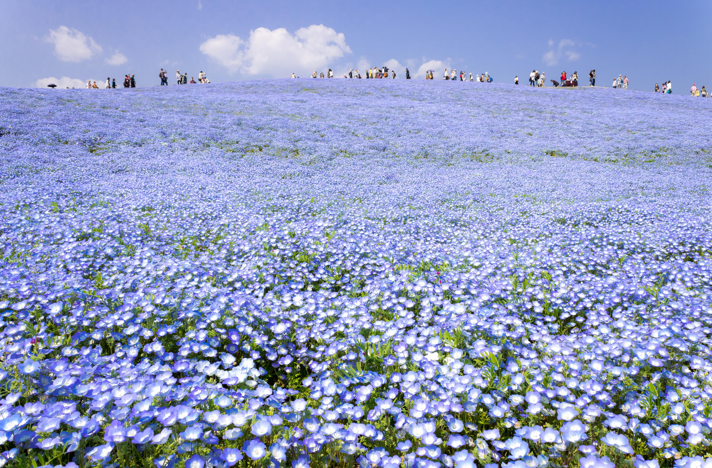 ひたち海浜公園,ネモフィラ。茨城県。